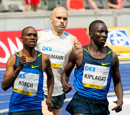 Kiplagat,Koech,Schumann